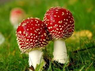 Two young Amanita muscaria